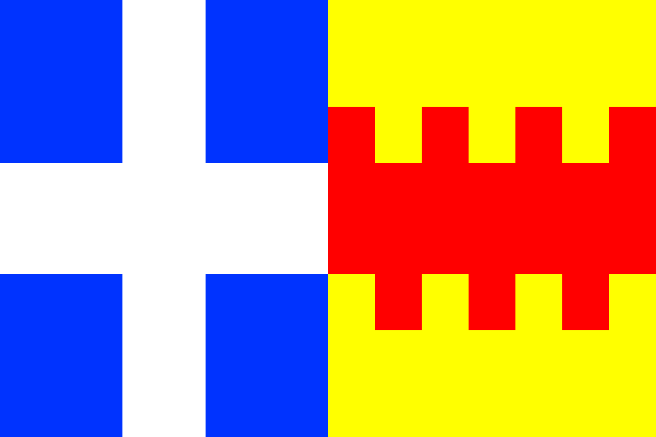 Vlag van de voormalige gemeente Sint-Michielsgestel, sinds 1997 de vlag van de plaats